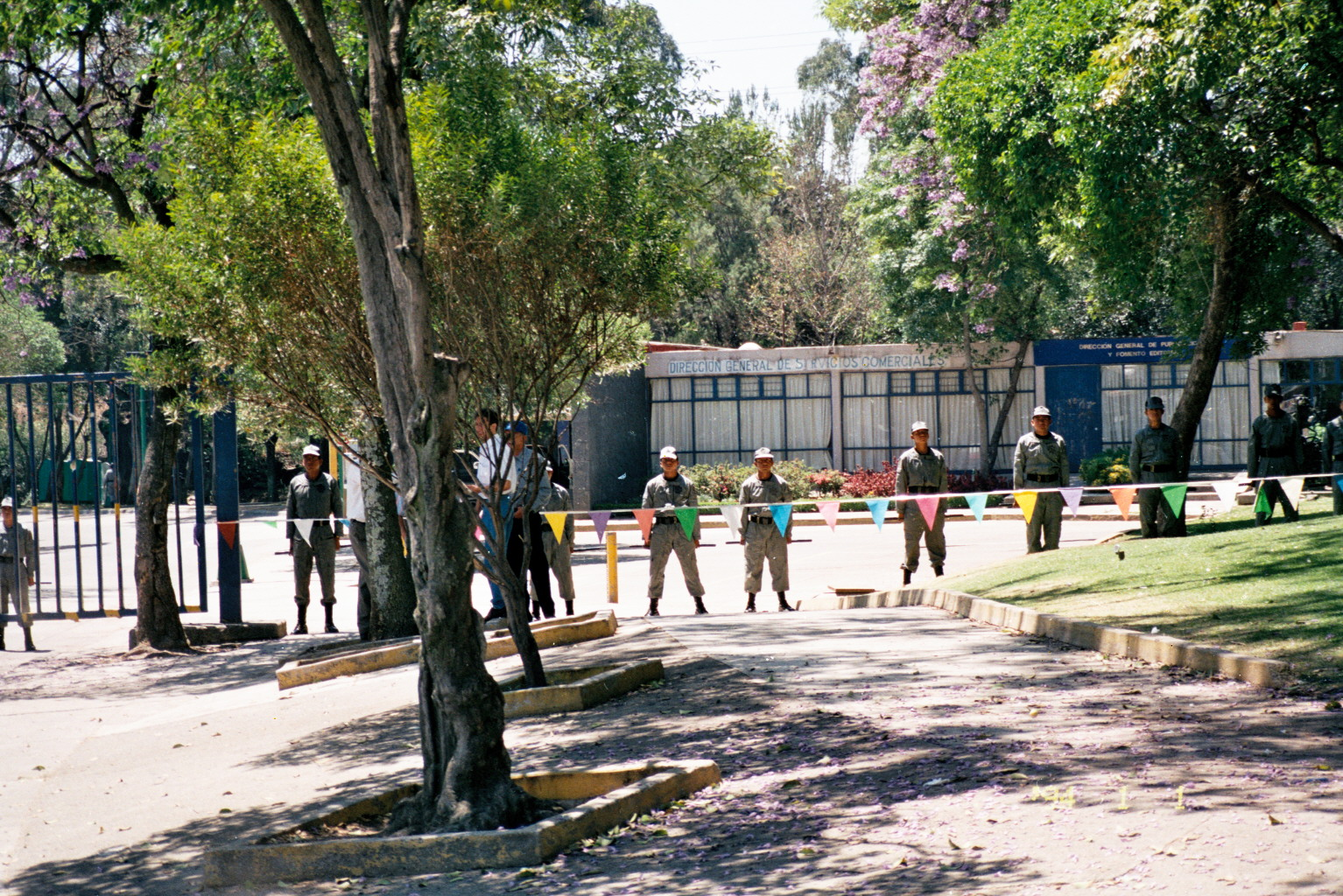 La PFP en las instalaciones de CU. Photo taken in UNAM, CU, Mexico City. Students conflict in 1999-2000. SPANISH: Foto tomada en la UNAM, CU, Ciudad de México. Durante la Huelga del CGH en la UNAM de los años 1999-2000.